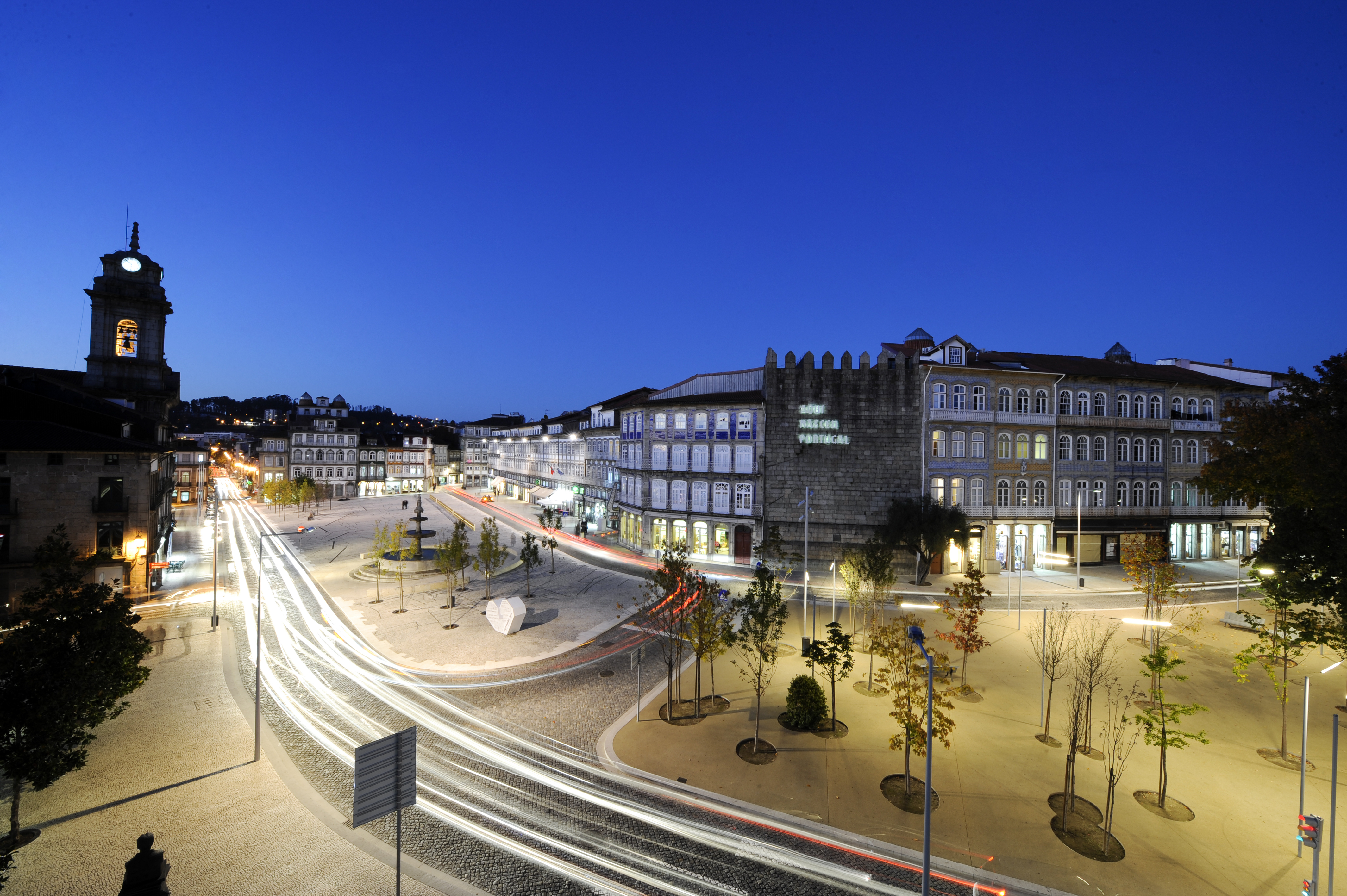 Largo do Toural, após a reabilitação concluída em 2012. Constitui-se como a ágora da cidade por excelência.